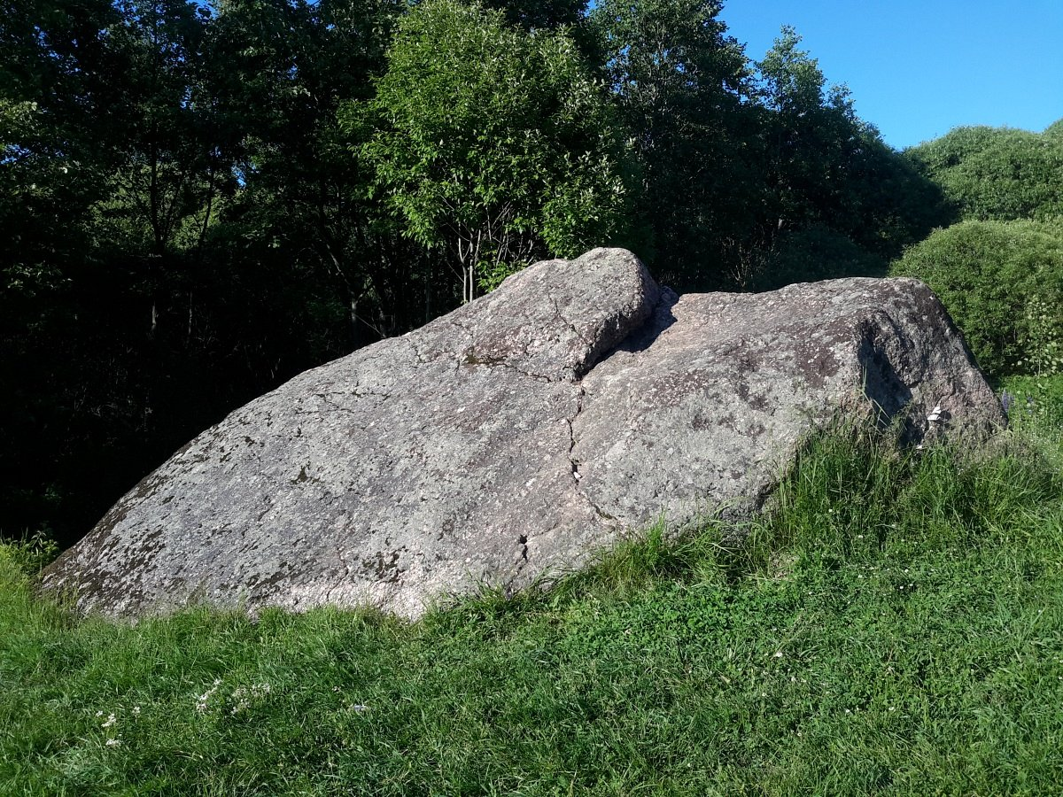 Горкі. Вялікі камень